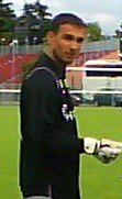 Richard Trivino lors du match US Créteil-UNFP du 14 juillet 2010